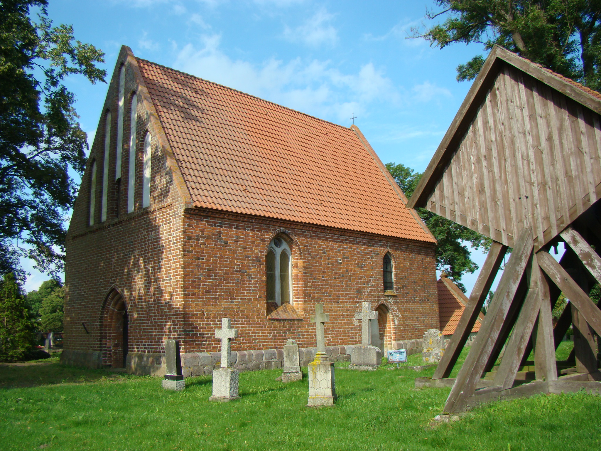 Kirche von Dahmen. Foto: Peter Schmelzle, August 2011.